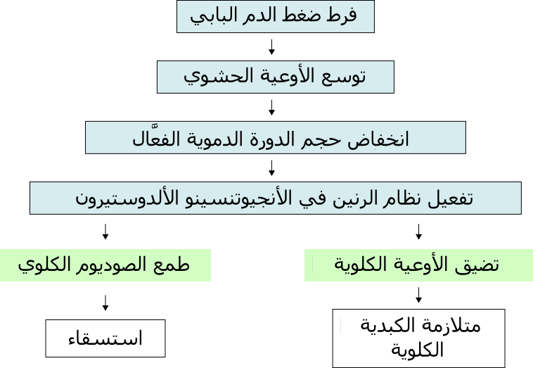 مُخطط يُظهر فرط ضغط الدم البابي الذي يؤدي إلى تضيق الأوعية الحشويَّة، مما يقلل من فعالة جهاز الدوران.